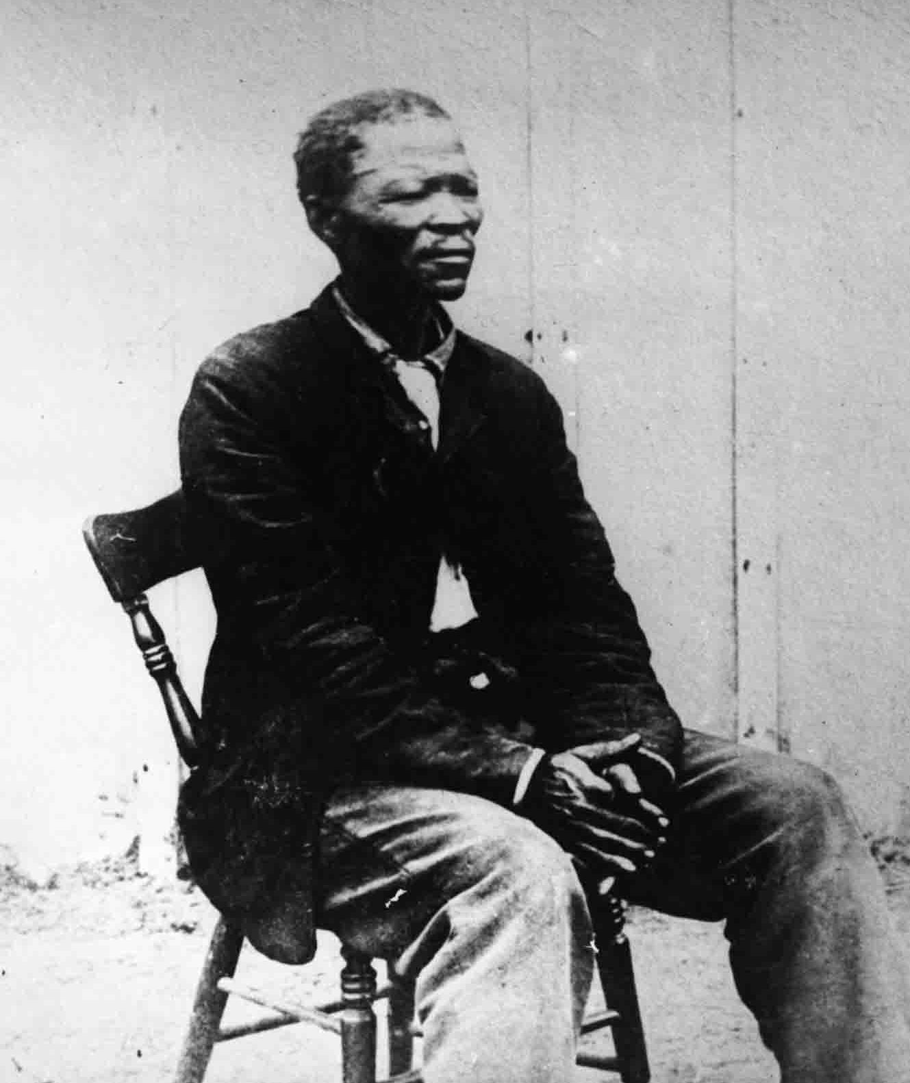 Jan Jonker Afrikaner (* 1820 in Windhuk, Südwestafrika; † 10. August 1889 bei Tsoabis, Südwestafrika)